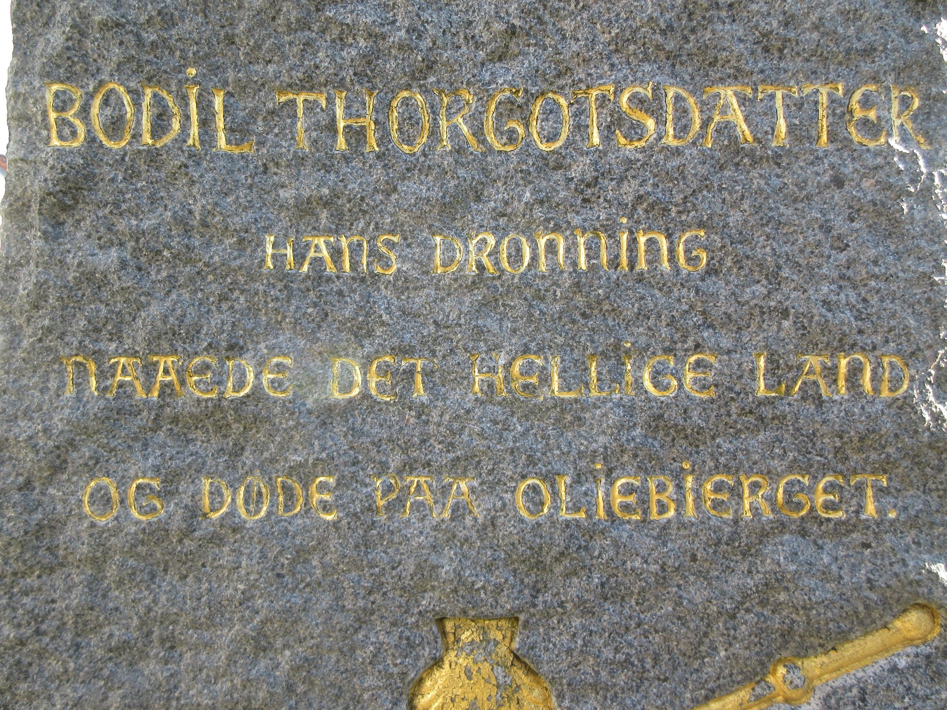 En mindesten for Erik Ejegod og hans dronning Bodil Thurgotsdatter blev i 1886 opsat i Erik Ejegods fødeby, Slangerup, på initiativ af byens Kingoforening. I 1922 fandt stenen sin nuværende placering på Hestetorvet i byen. Såvel Erik som Bodil døde fjernt fra Danmark i 1103 under pilgrimsrejse til Det Hellige Land. Her vises et udsnit af stenen, der vedrører indskriften dedikeret Dronning Bodil.